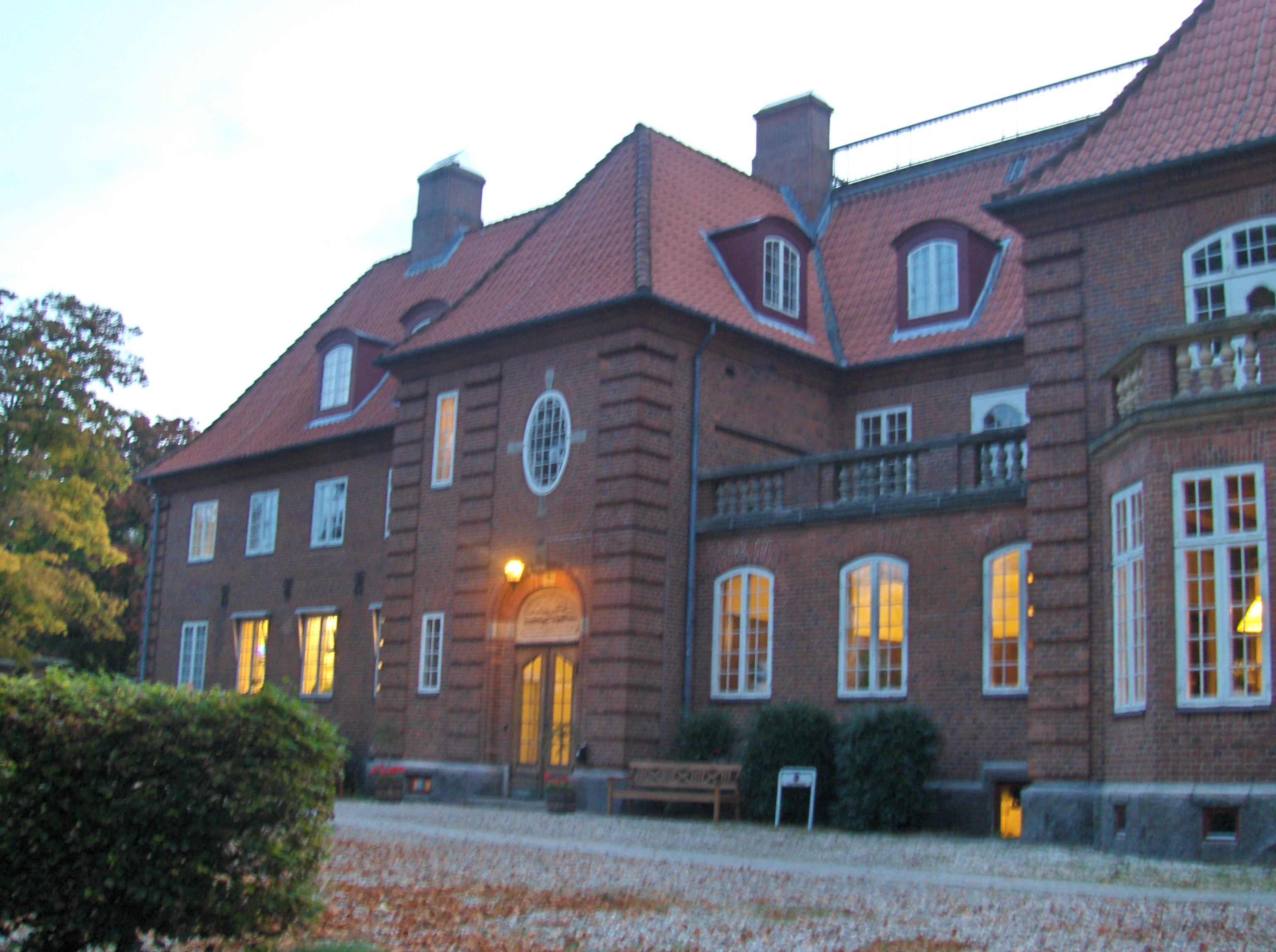 Magleås herregård ved Birkerød i Danmark